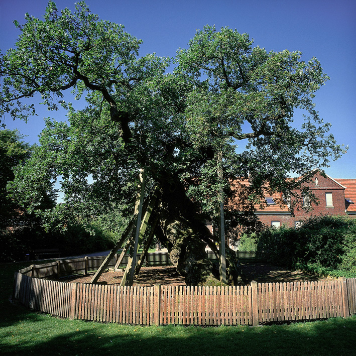 Femeiche (Quercus robur) in Erle